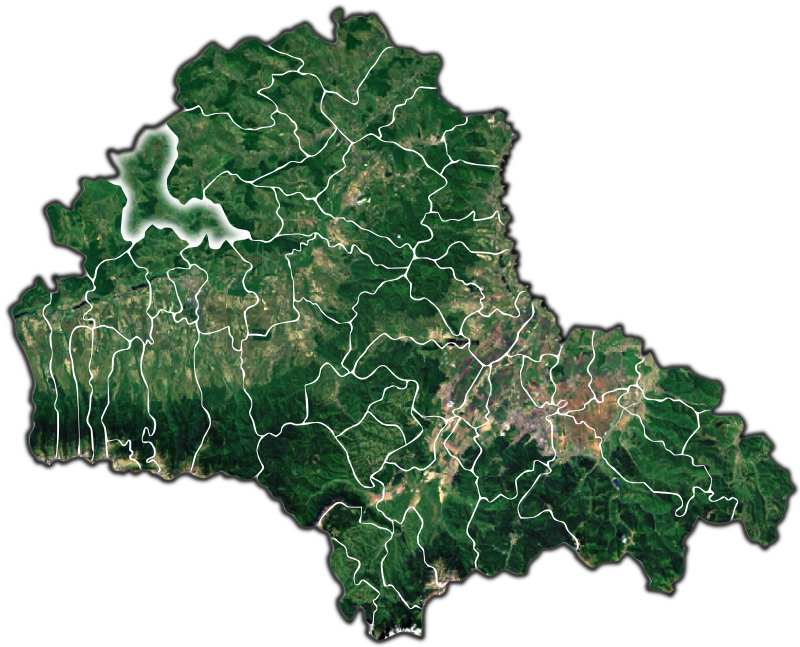 Soars jud Brasov.